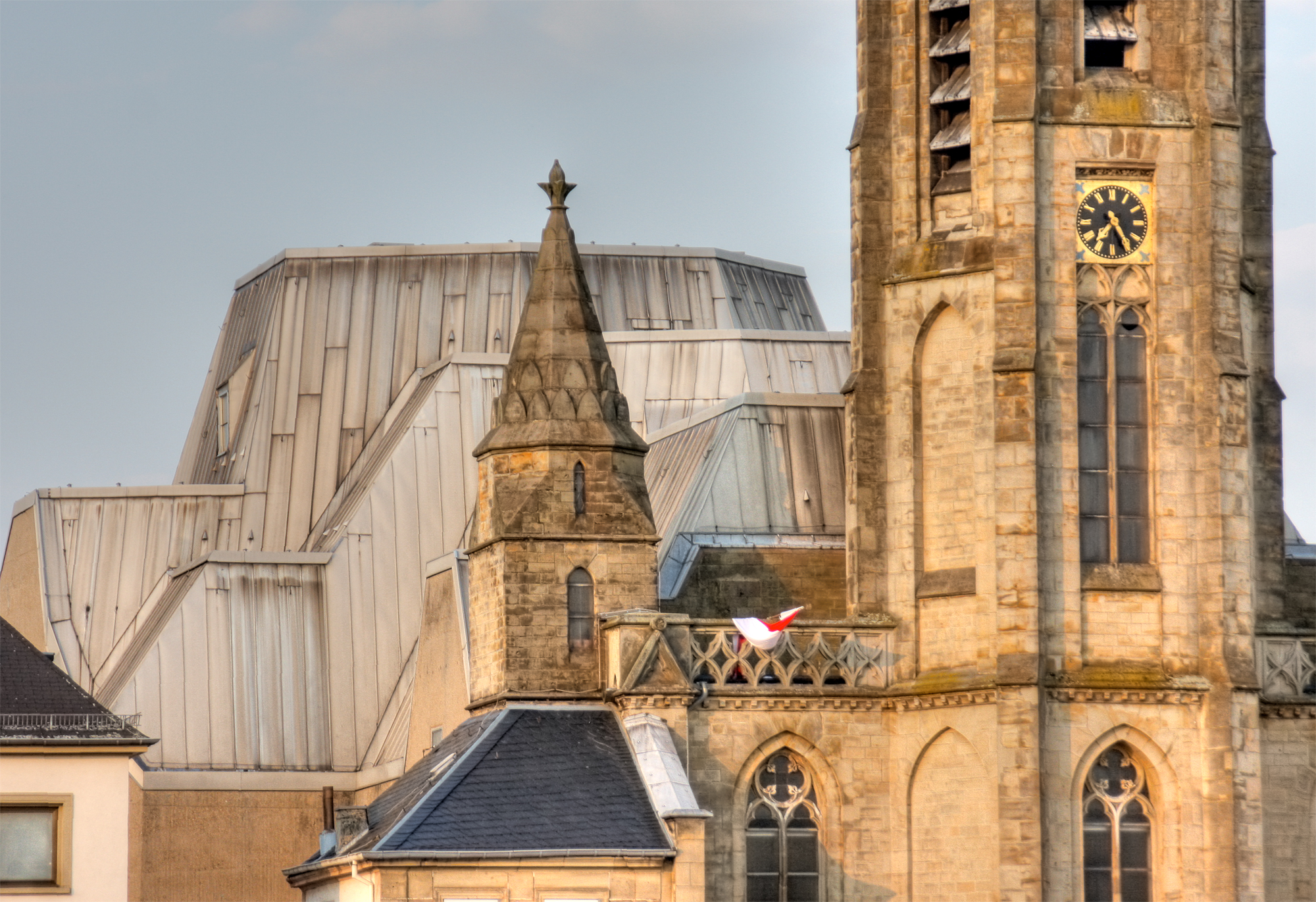 Pfarrkirche St. Ludwig, Saarlouis, Architekt Kirchenschiff: Gottfried Böhm